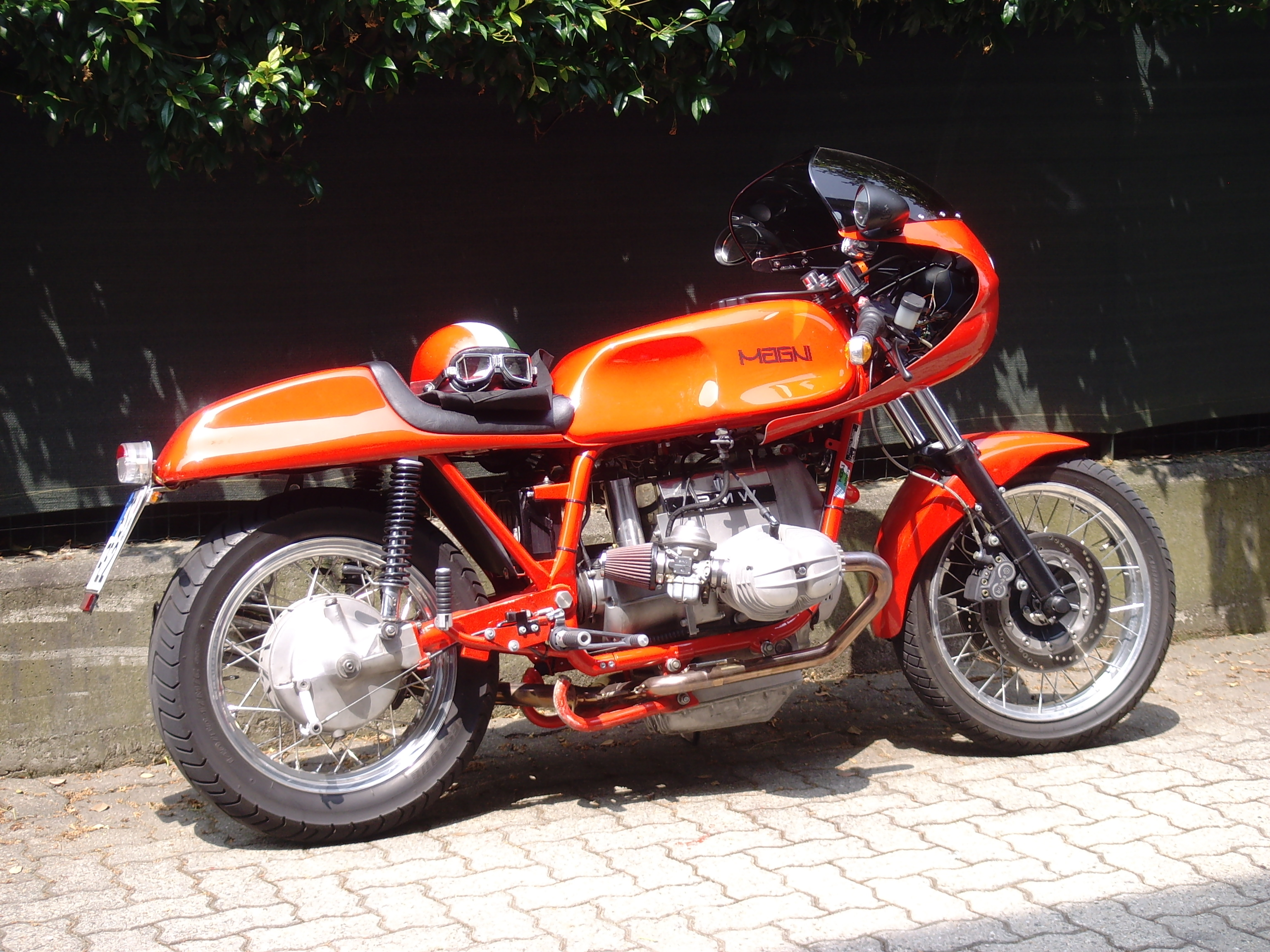 Magni 1000 MB1 (1983-1984) con propulsore BMW